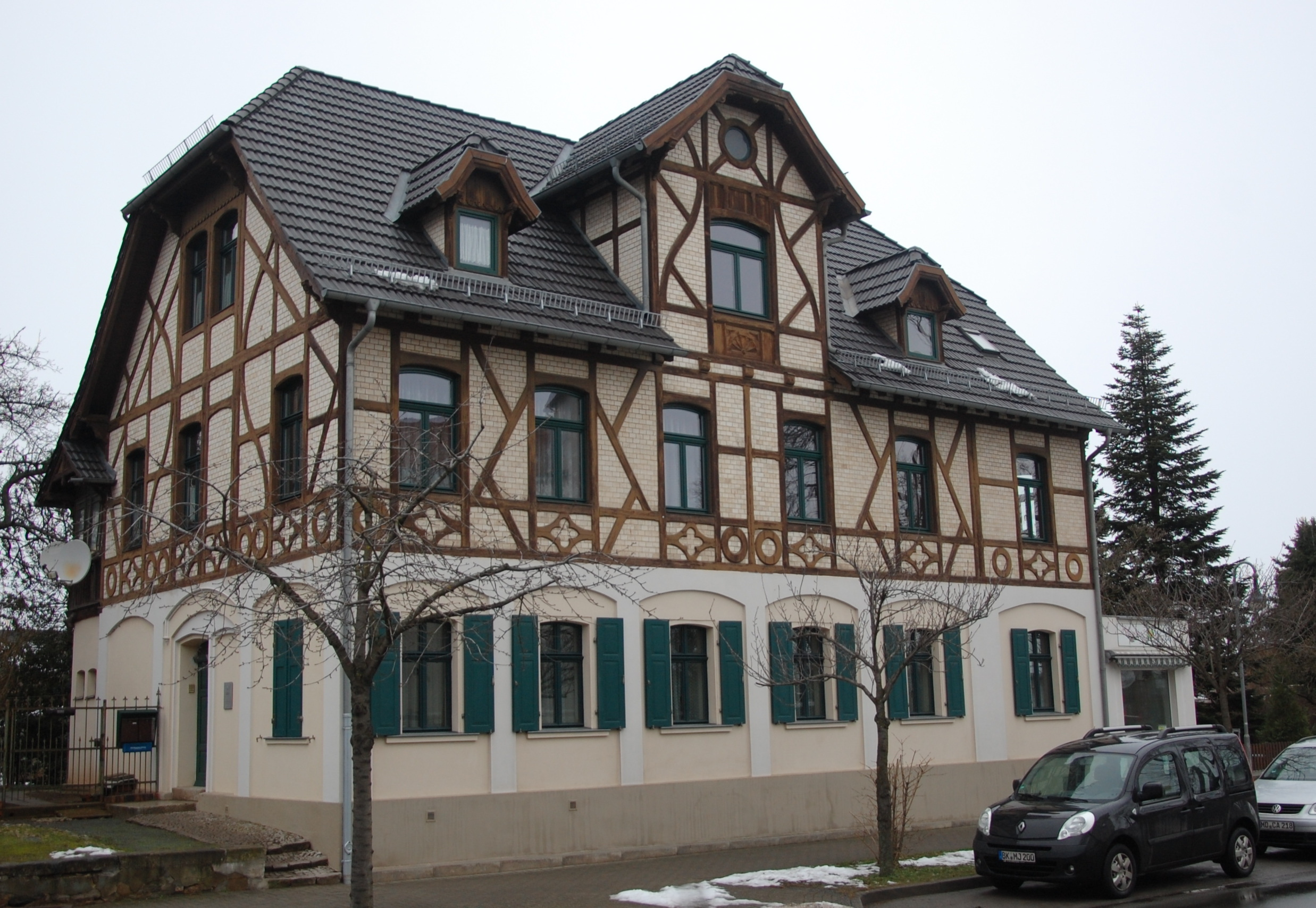 Haus Bahnhofstraße 34 in Gernrode